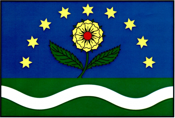 vlajka, Orlické Podhůří, okres Ústí nad Orlicí